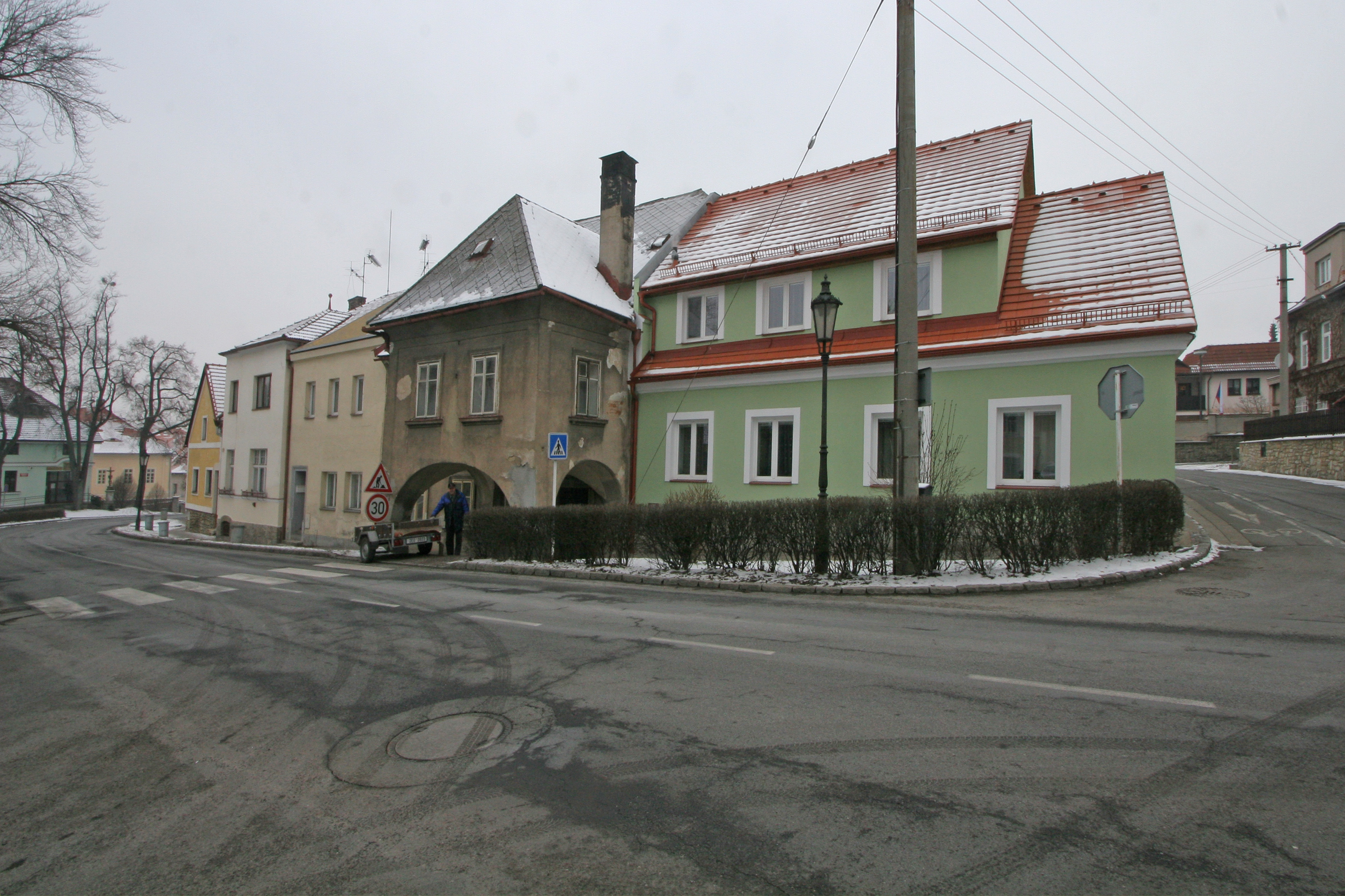 Litomyšl Jiráskovo náměstí čp. 6